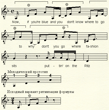 Анализ фрагмента песни Puttin' on the Ritz